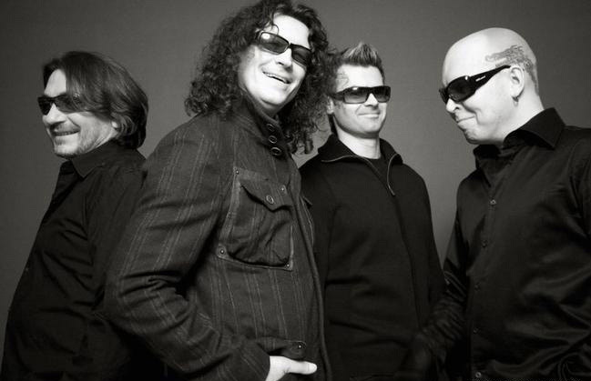 Группа "СерьГа". Алексей Никишин.2008